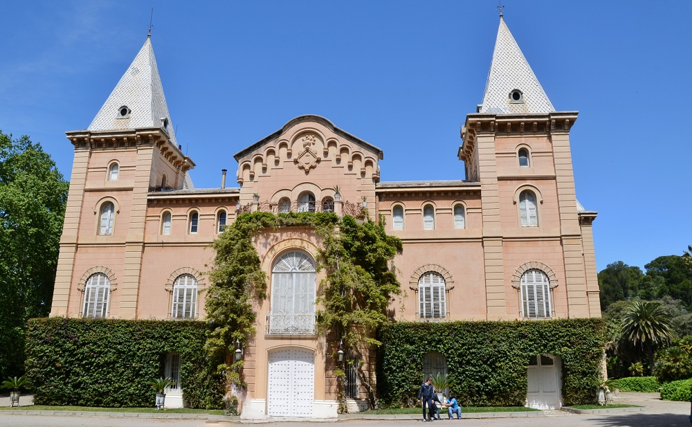 Parc Samà (Cambrils)